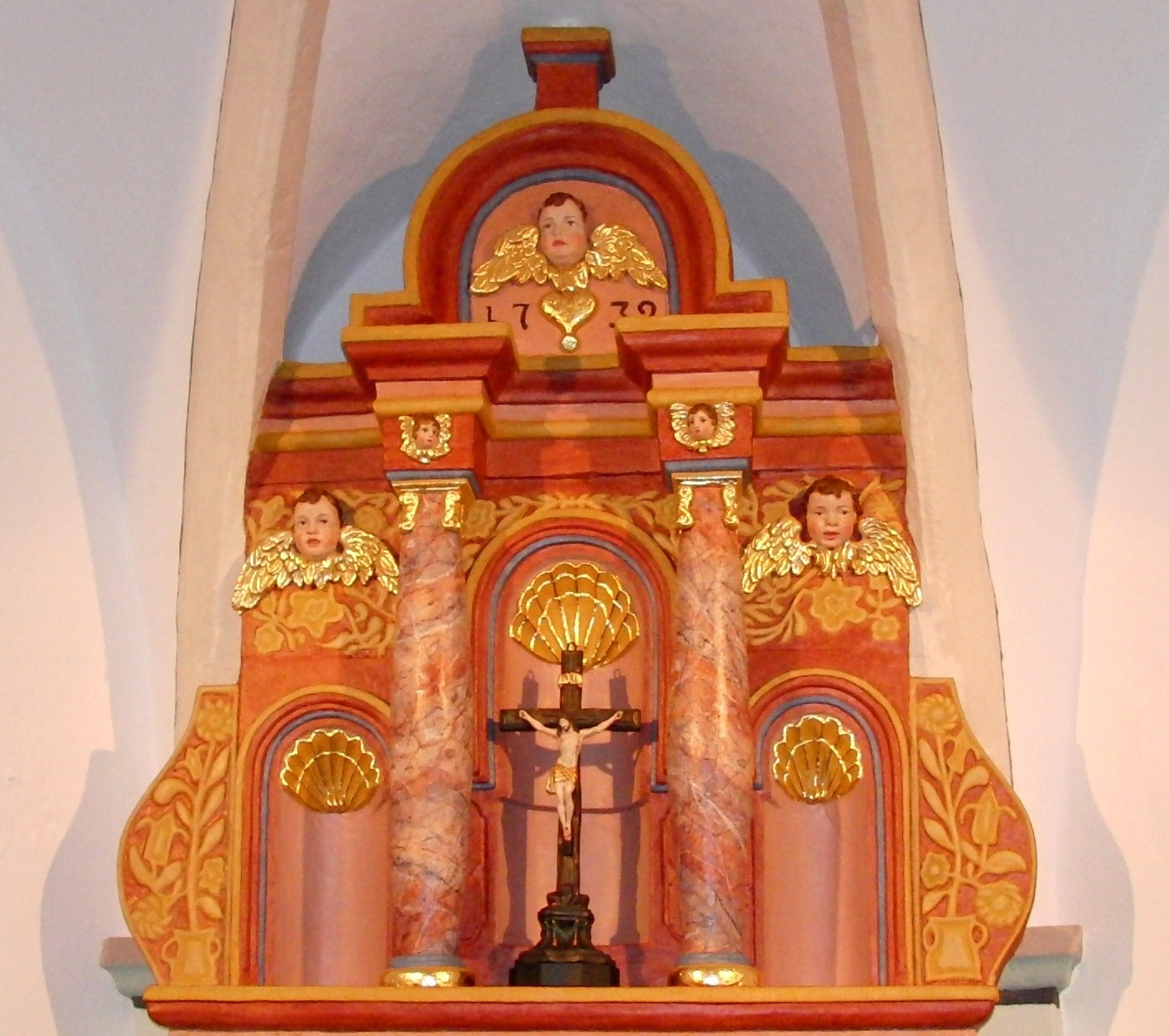 Altaraufsatz in der Filialkirche im Ortsteil Hamm, Taben-Rodt. Das Retabel zeigt noch Züge der Renaissance. Es dürfte in der ersten Hälfte des 17. Jahrhunderts entstanden sein.